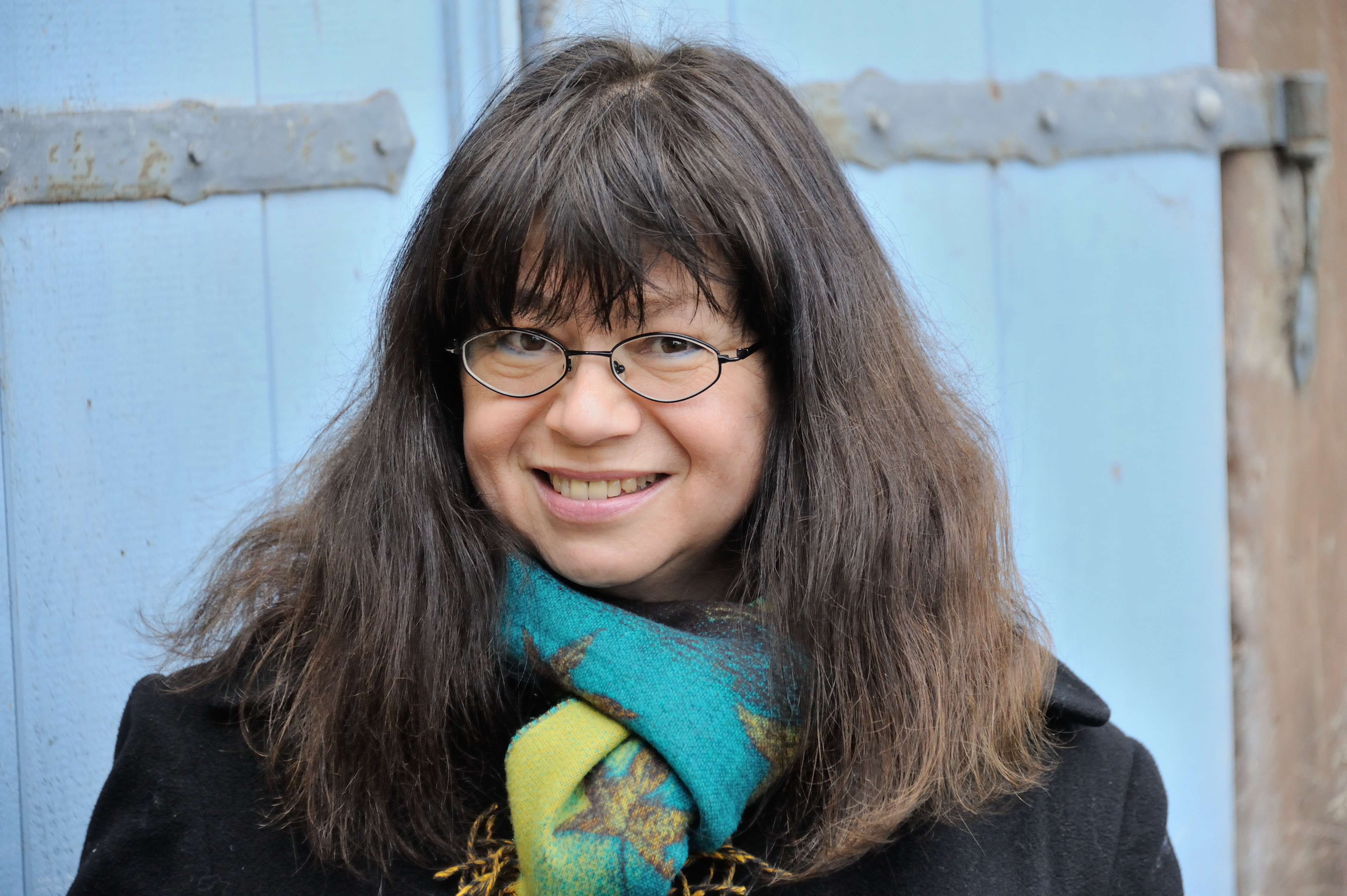 Die Schriftstellerin Claudia Schmid lebt und arbeitet in der Metropolregion Rhein-Neckar.